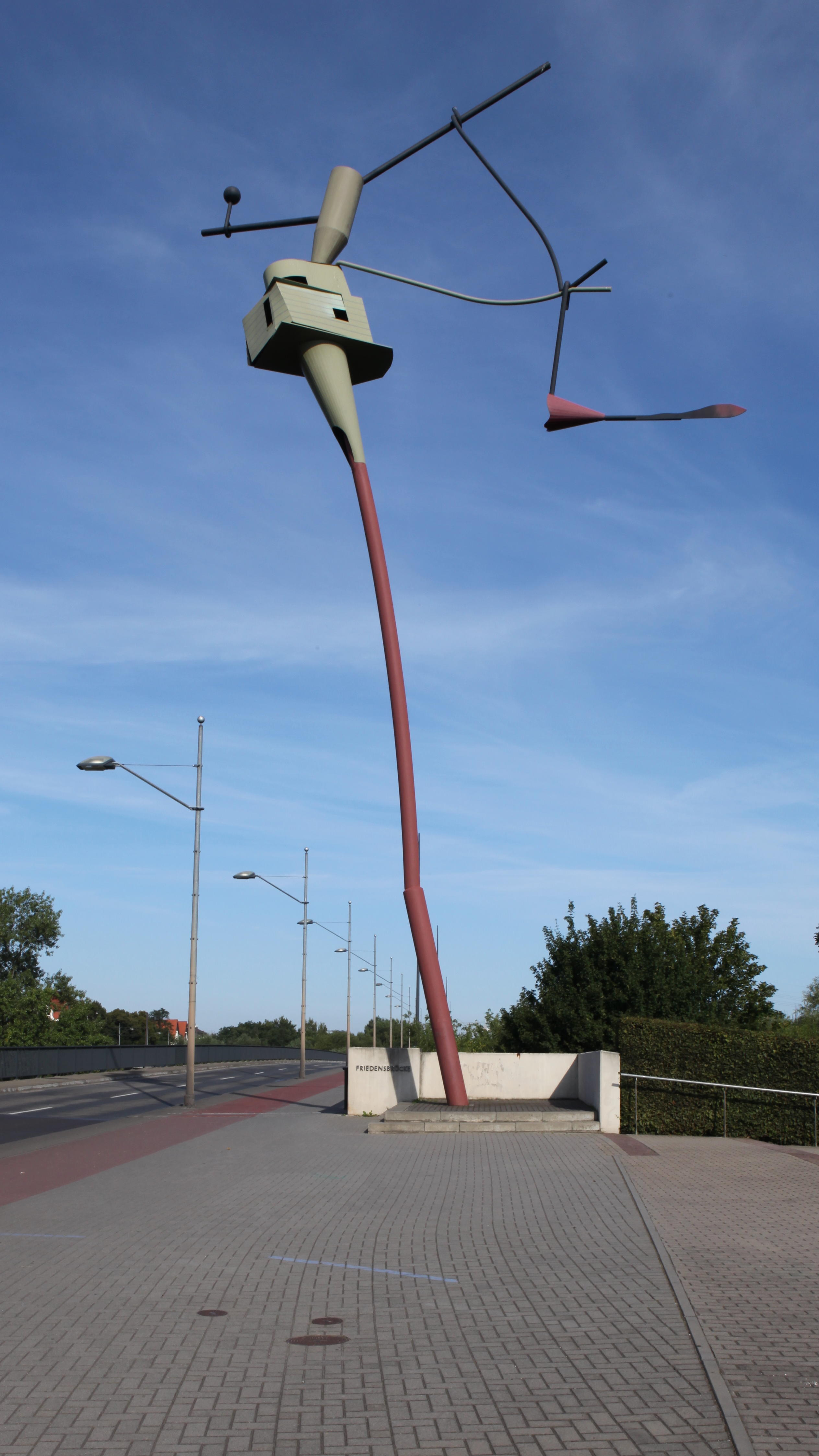 Skulptur „Daphne“ des niederländischen Künstlers Auke de Vries an der nördlichen Brücke des Friedens über die Alte Elbe in Magdeburg